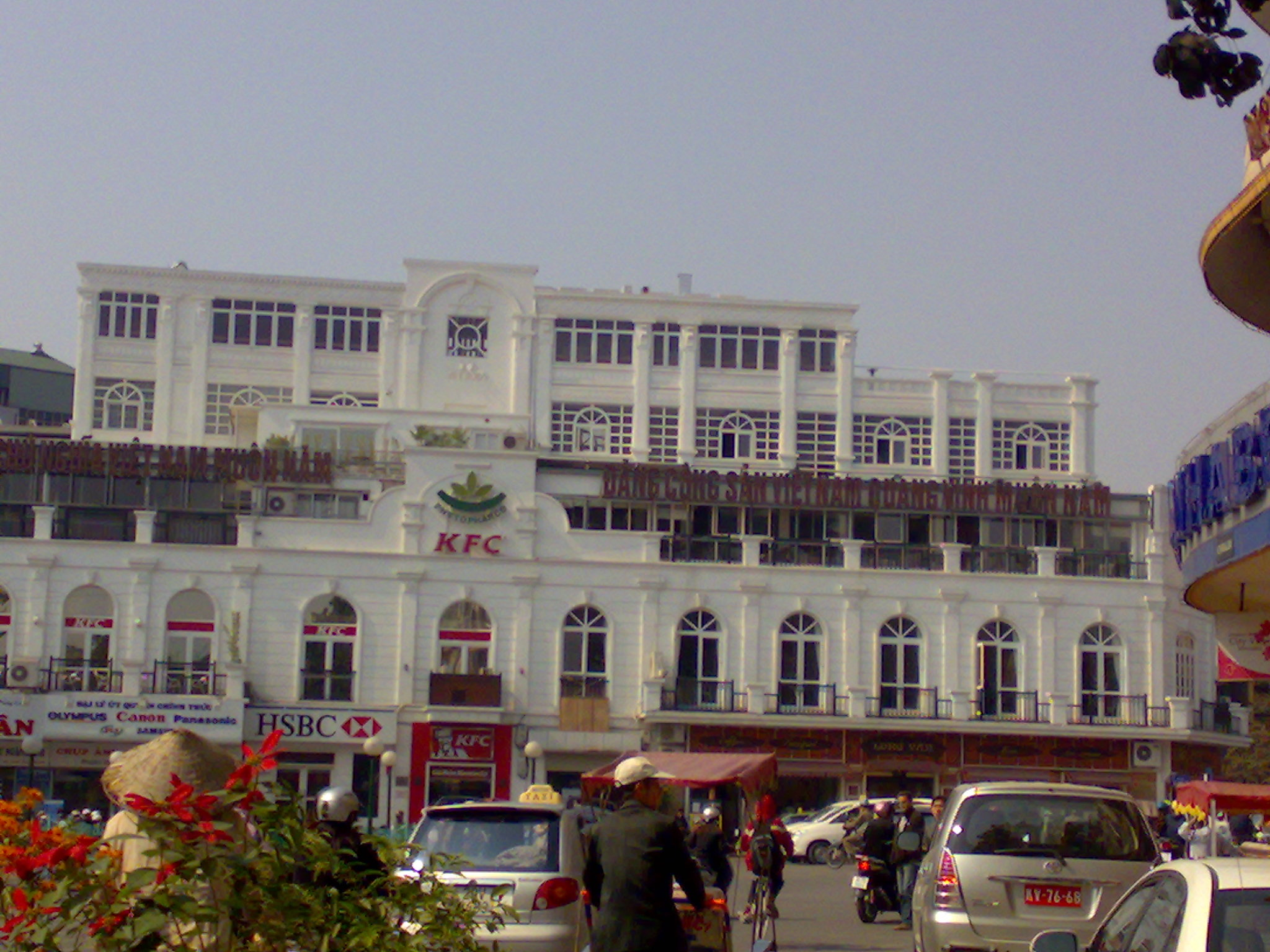 KFC at Hanoi, Vietnam